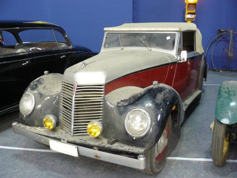 Retromobile 2012 1947 Hurricane drophead coupé